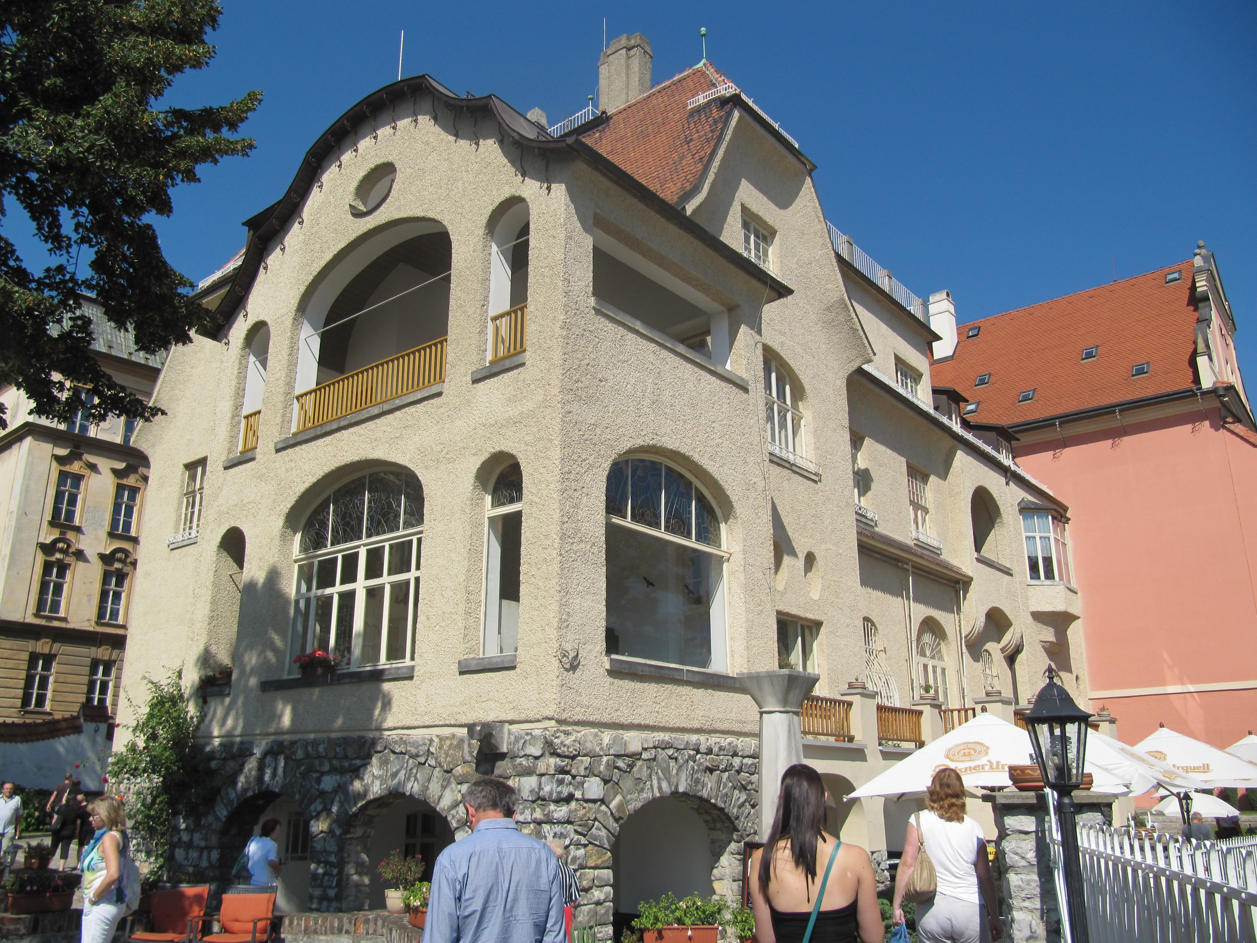 Vila Primavesi (Olomouc), Universitní 224/7, Olomouc